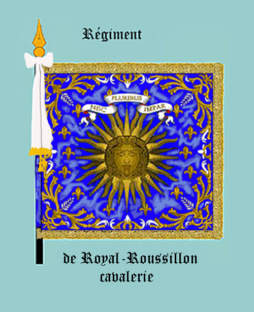 Standarte des Kavallerieregiments „Royal Roussillon“ Königreich Frankreich